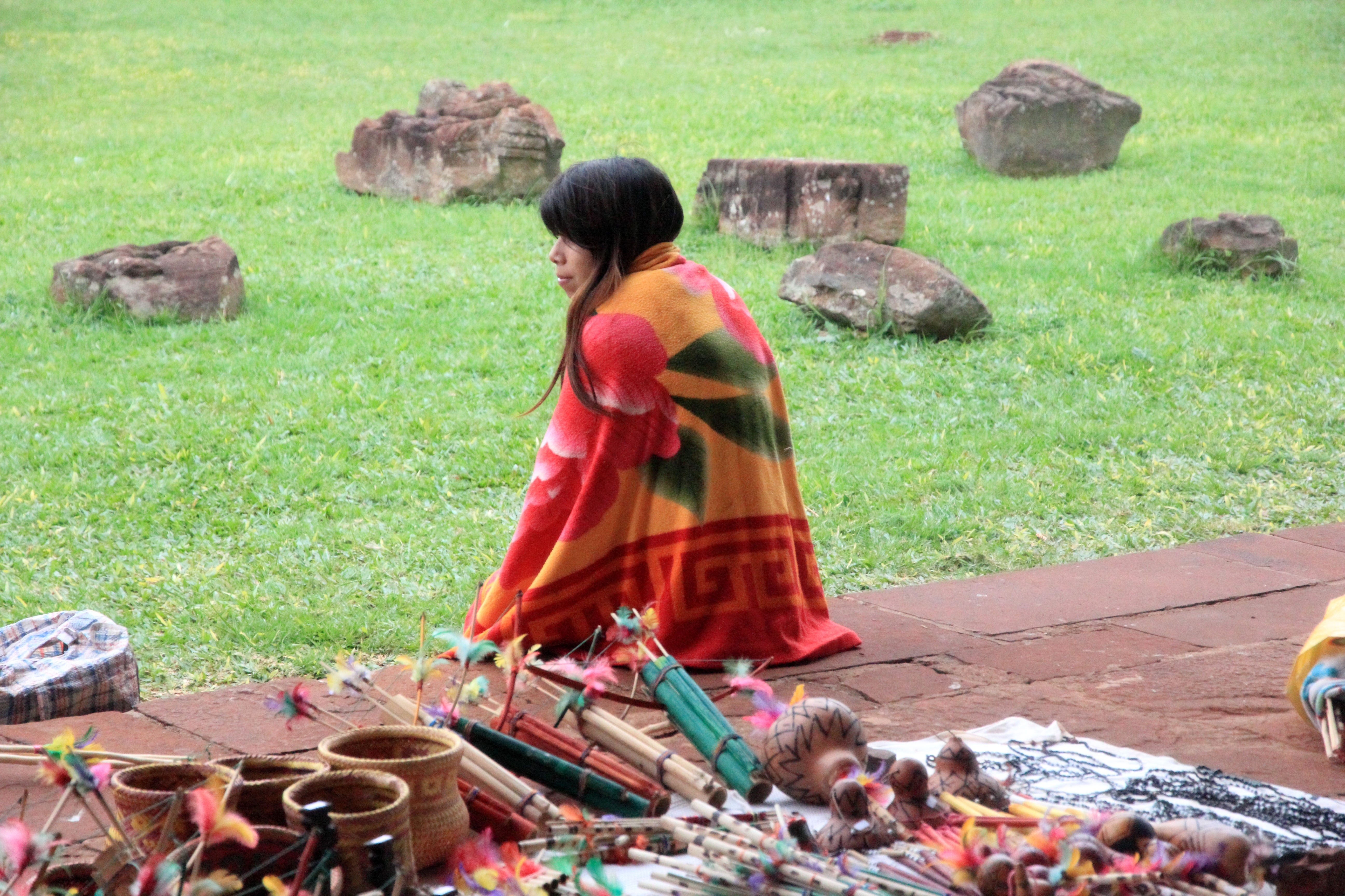 Sítio Arqueológico de São Miguel Arcanjo em São Miguel das Missões, RS.